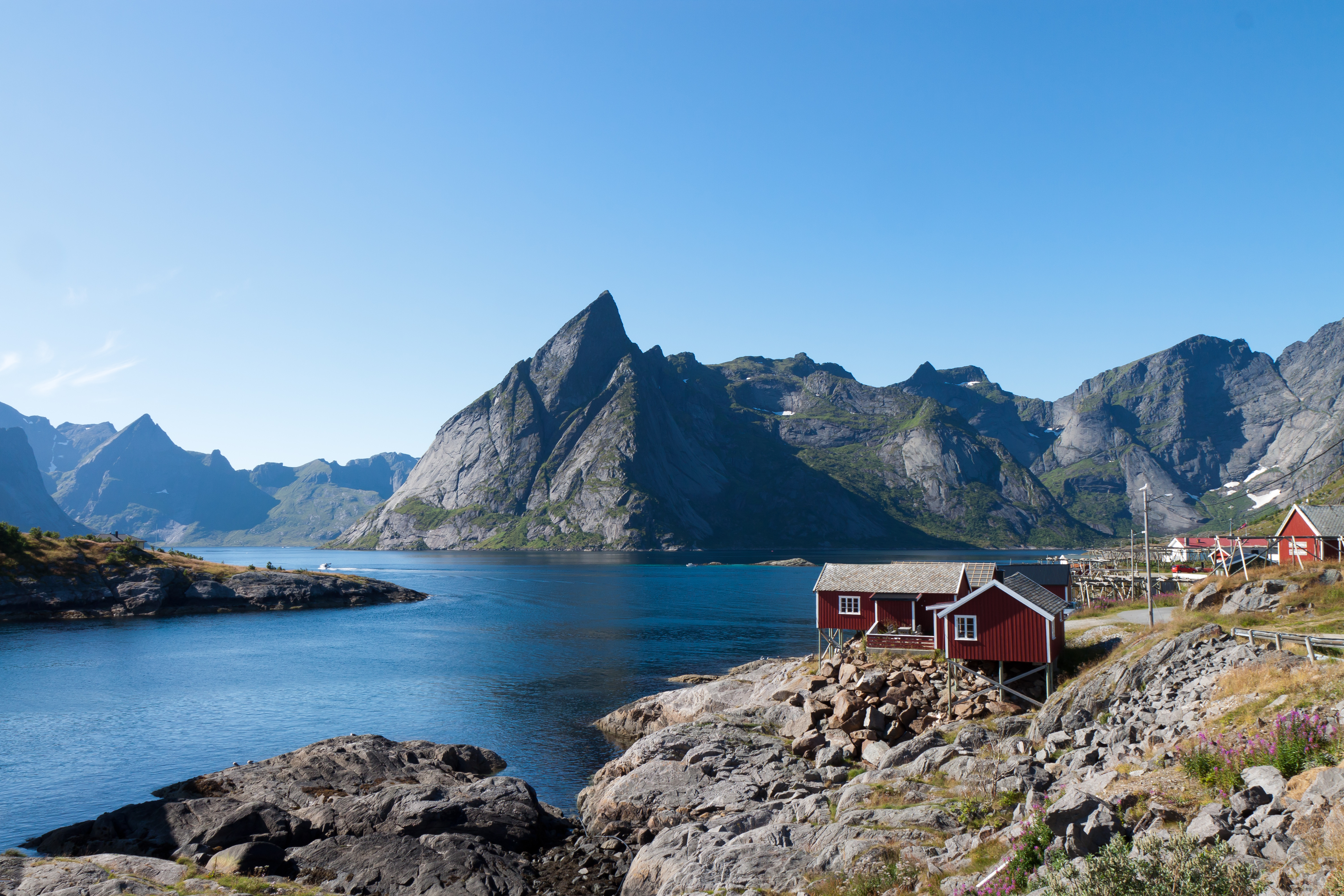 Hamnøya, Olstinden and Reinefjorden